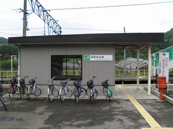 Uzen-Nakayama Station, Kaminoyama, Yamagata, Japan